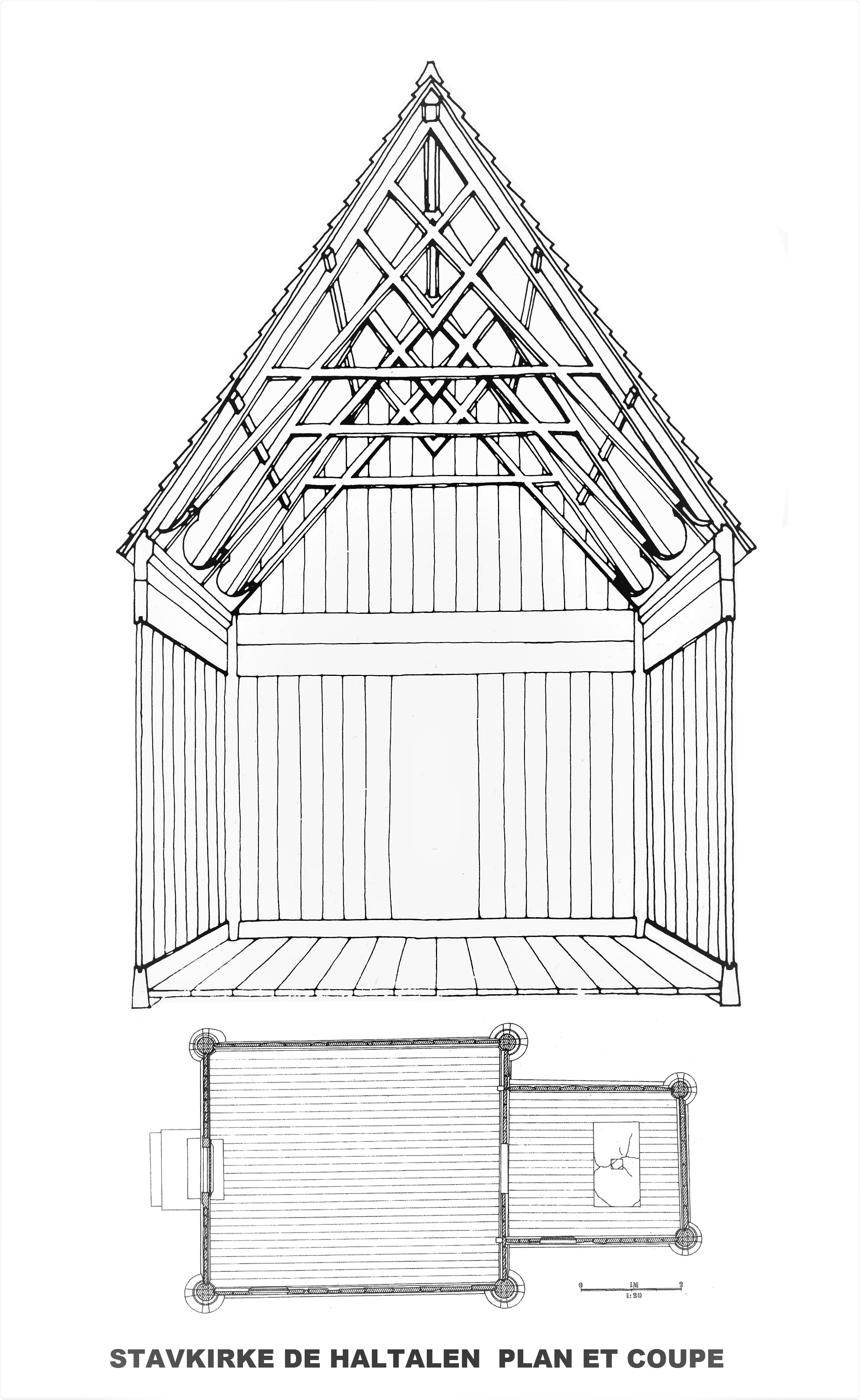 Stavkirke de Haltalen, Norvège. Plan et coupe (Montage de deux documents commons, Hakon Christie)